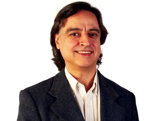 Imagen de Eduardo Macaluse publicada en la página de la Honorable Cámara de Diputados de la Nación.